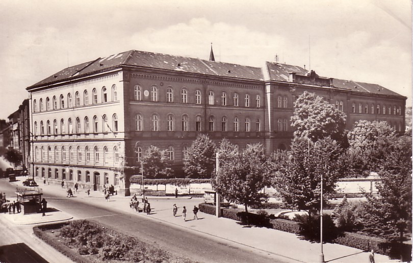 Ehemaliges "Königlich Ungarisches Landes-Krankenhaus" (erbaut 1864)